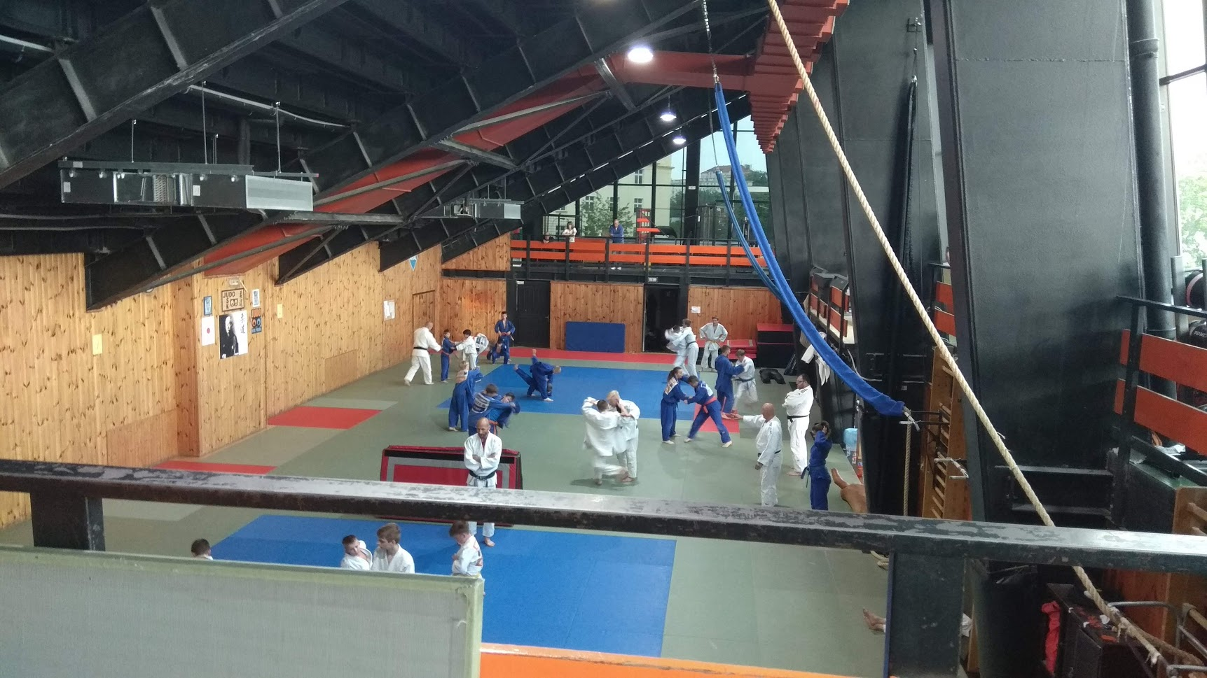 Pohled na dojo ve sportovní hale Folimanka zezhora z posilovny.